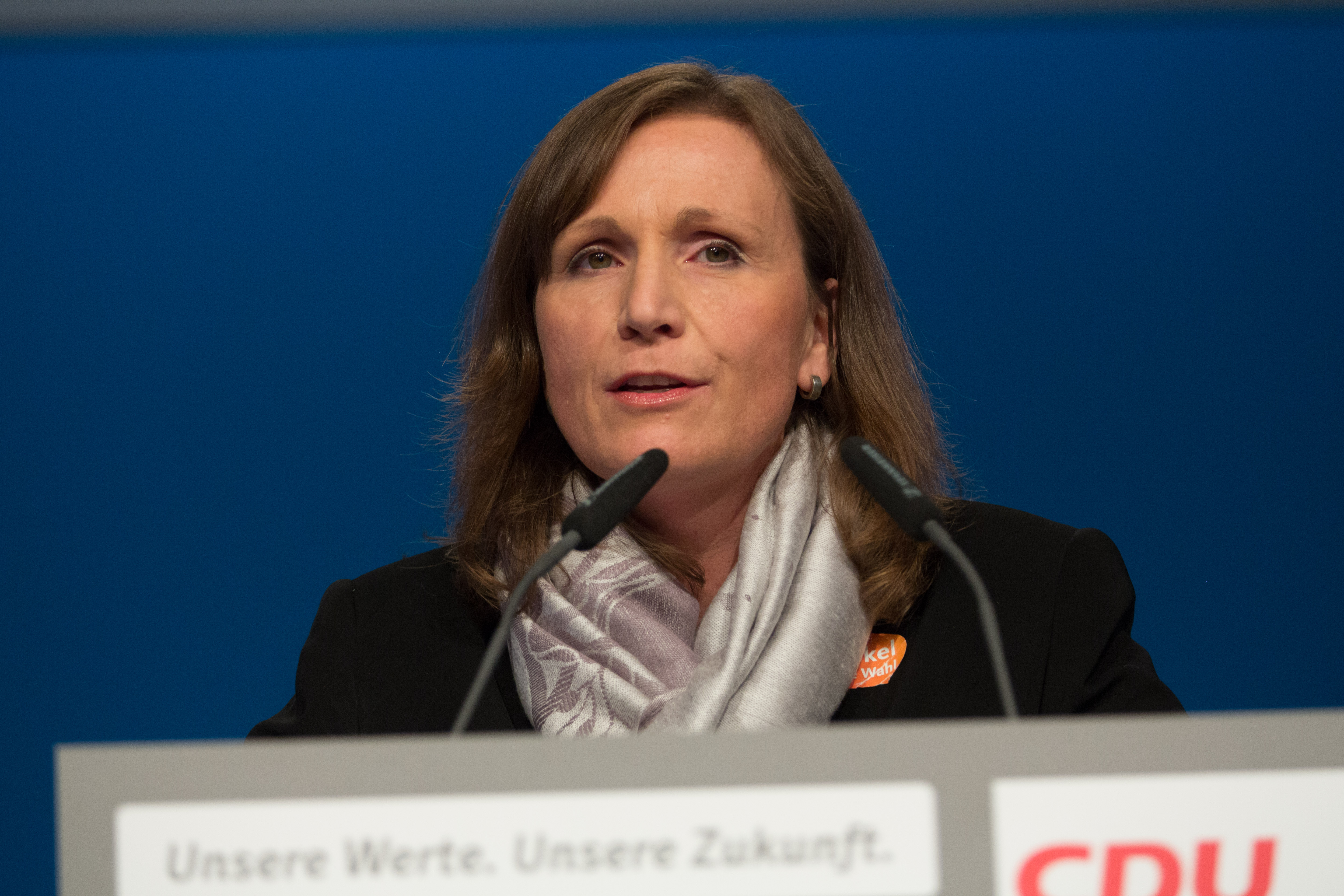 Monica Wüllner, Mitglied des CDU-Bundesvorstandes auf dem 29. Parteitag der CDU Deutschlands am 6. Dezember 2016 in Essen, Grugahalle